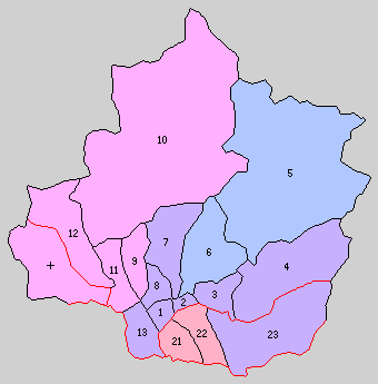 群馬県利根郡の町村。